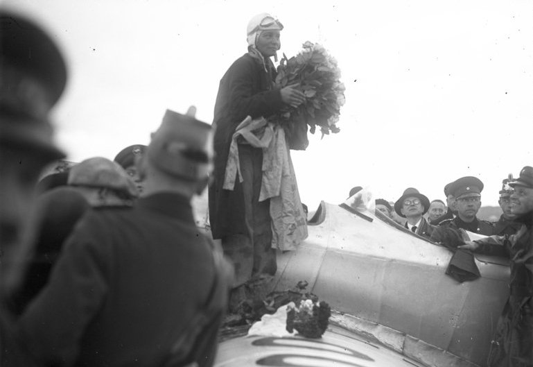 Die Ankunft der erfolgreichen 22 jährigen Afrikafliegerin Elli Beinhorn auf dem Centralflughafen in Berlin-Tempelhof! Die 22 jährige deutsche Afrika-Fliegerin Elli Beinhorn wird nach ihrer gefahrvollen Expedition auf dem Tempelhofer Flughafen feierlichst begrüsst.